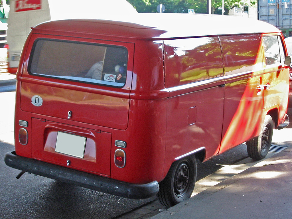 VW Transporter, T2a